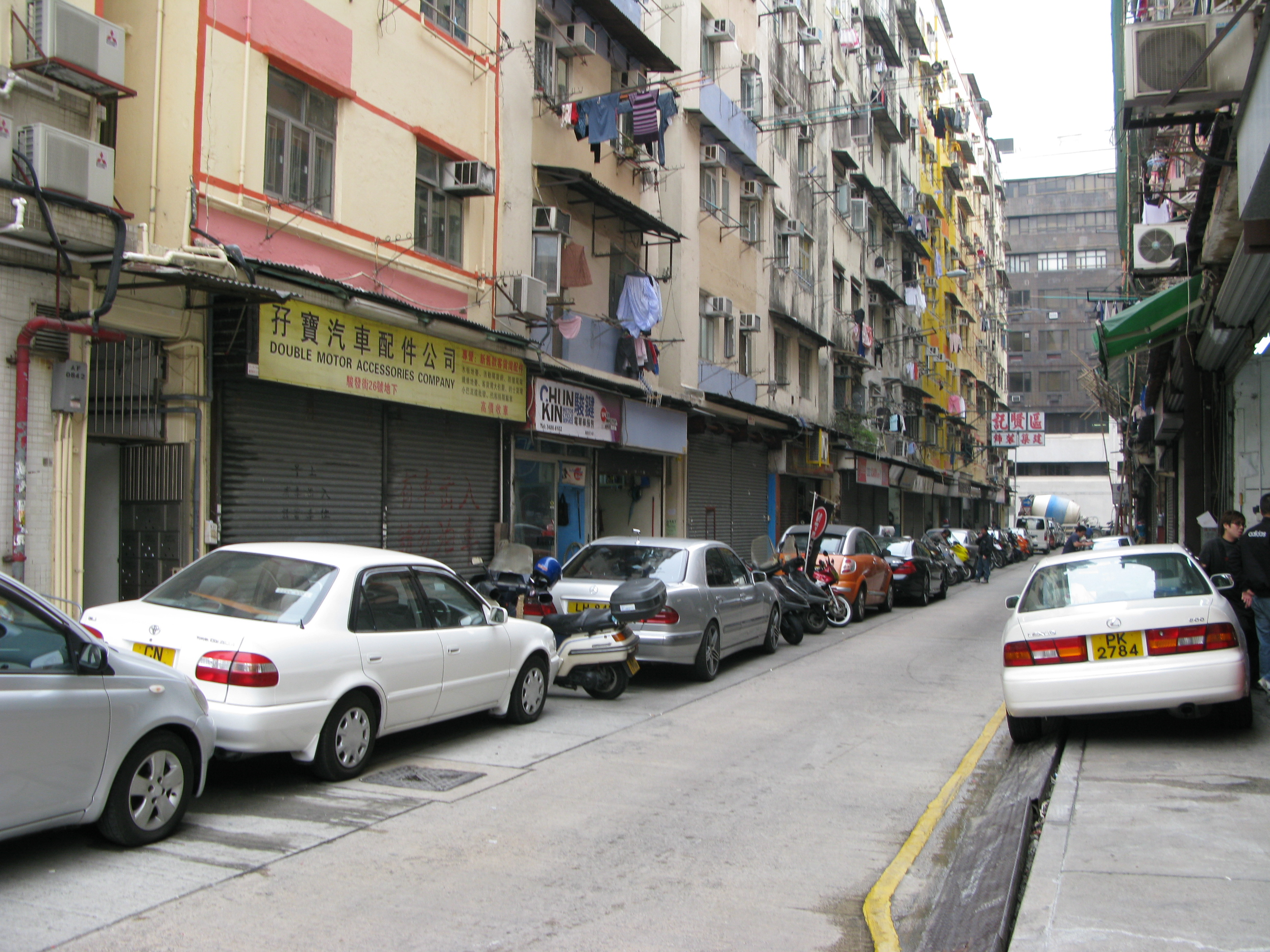 中文（香港）: 香港九龍土瓜灣十三街駿發街